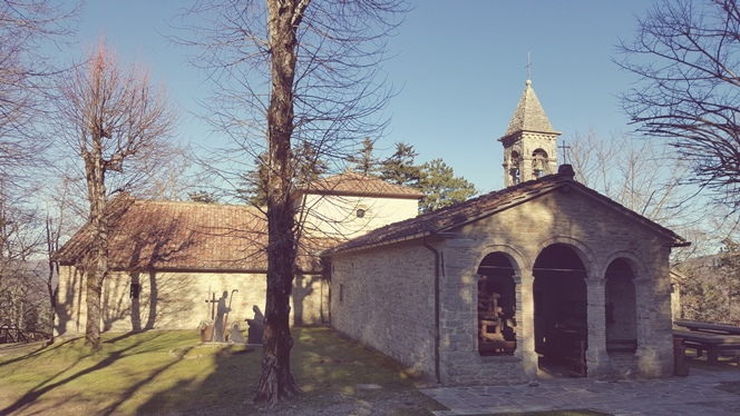 Il Santuario di Corzano This is a photo of a monument which is part of cultural heritage of Italy.